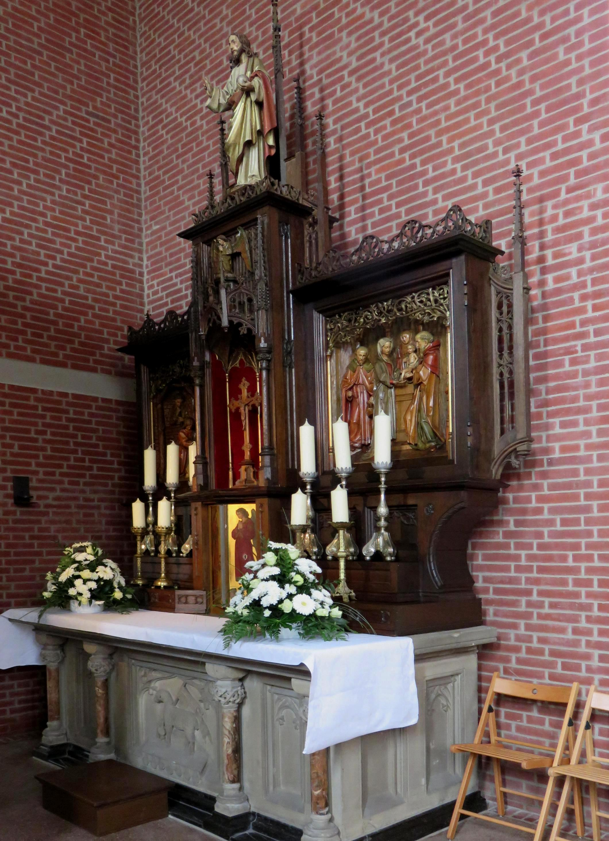 Bild aus der Martinuskapelle in Borschemich (neu)